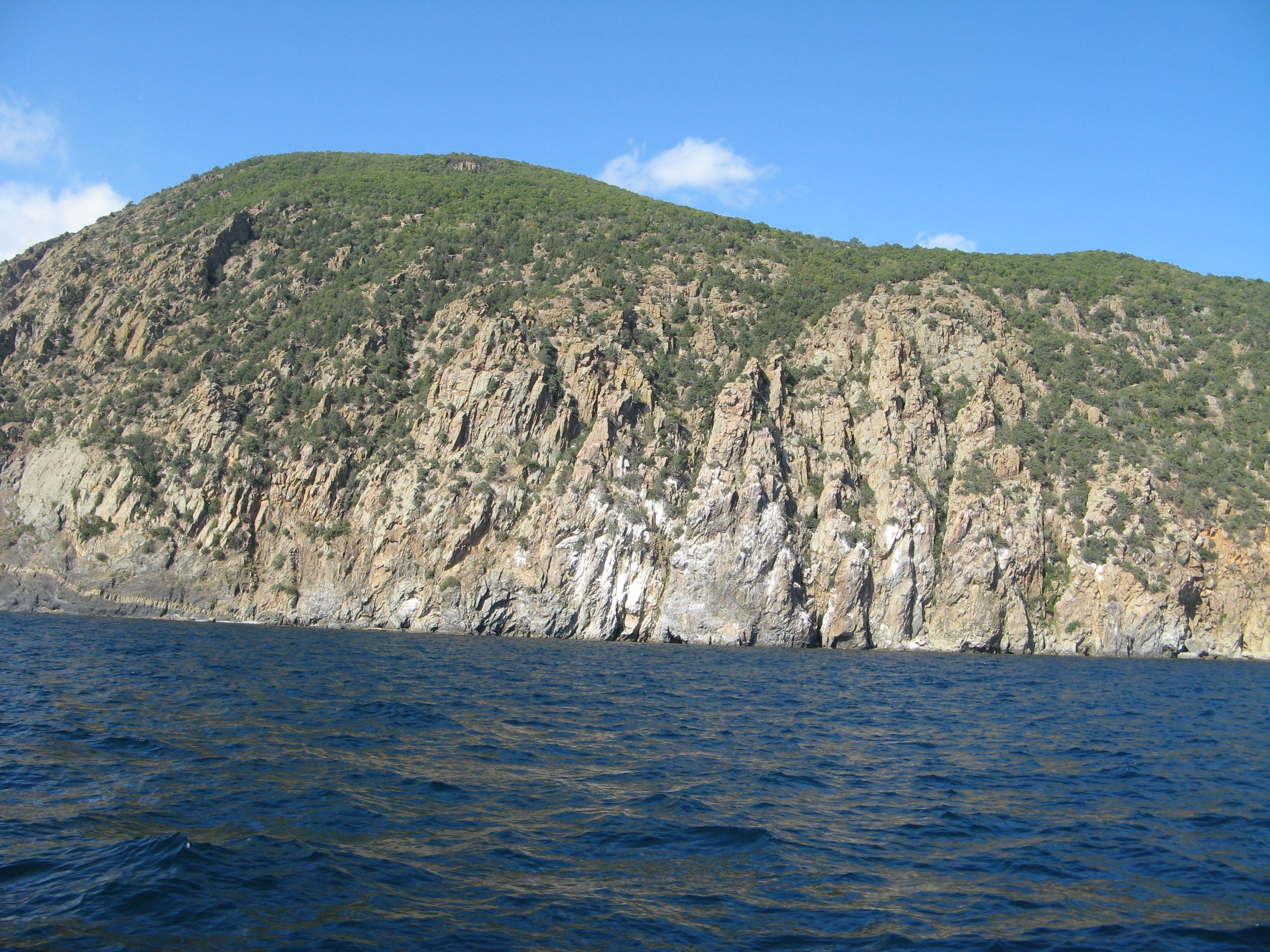 Аю-Даг, Запрудниньське л-во, кв.32 сел. Партеніт